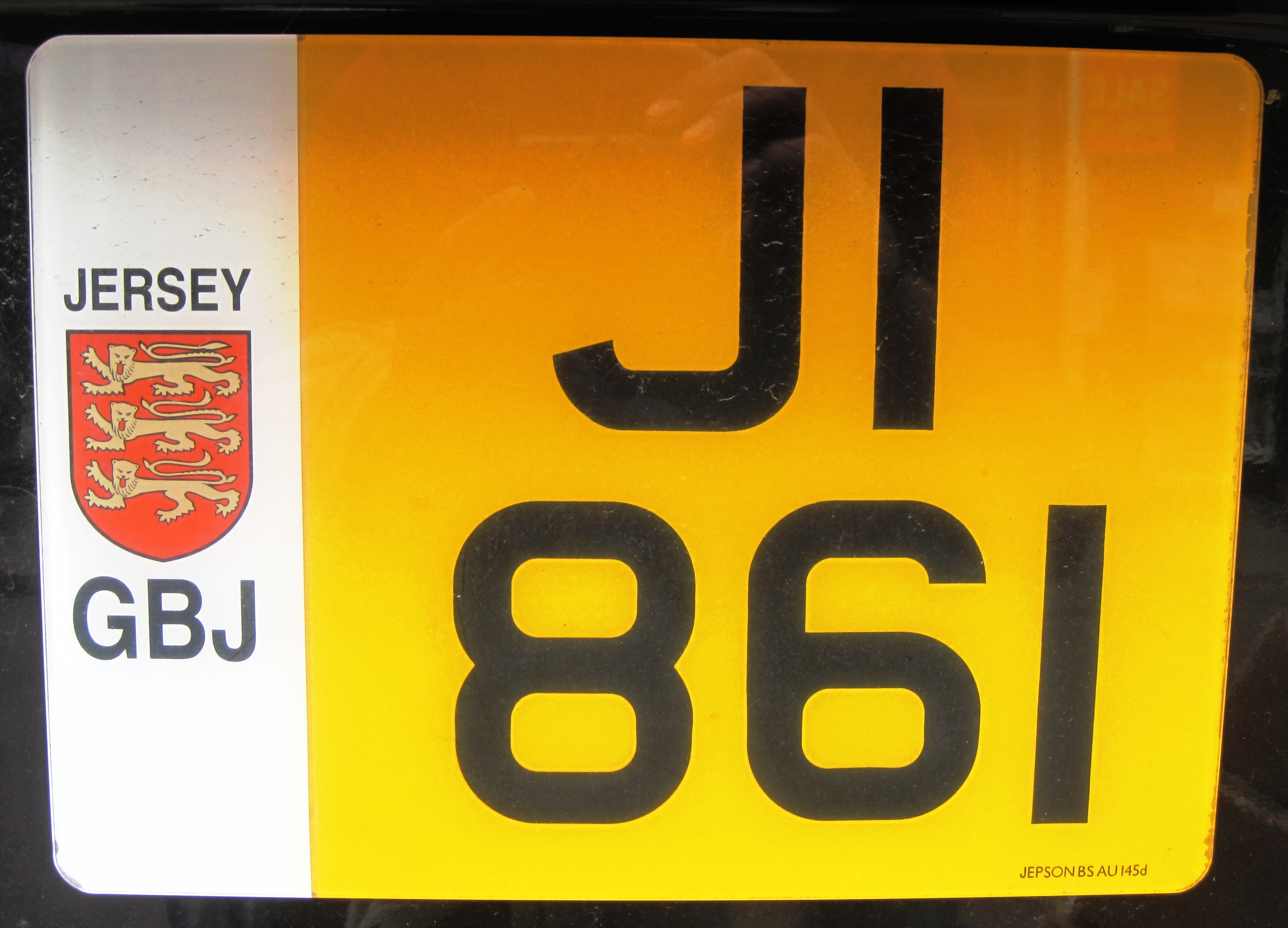 kentekenplaat Jersey achter